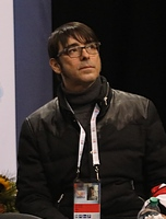 Жан-Франсуа Балестер, тренер победителей этапа Гран-при в США Алёны Савченко и Бруно Массо